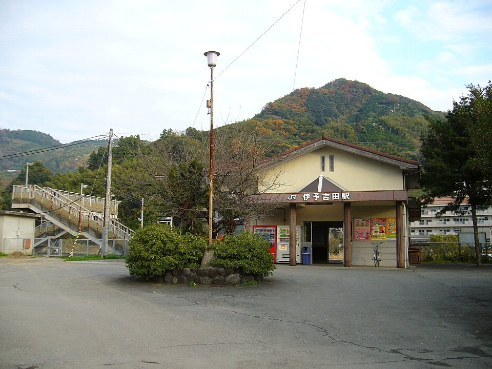 予讃線伊予吉田駅 駅舎